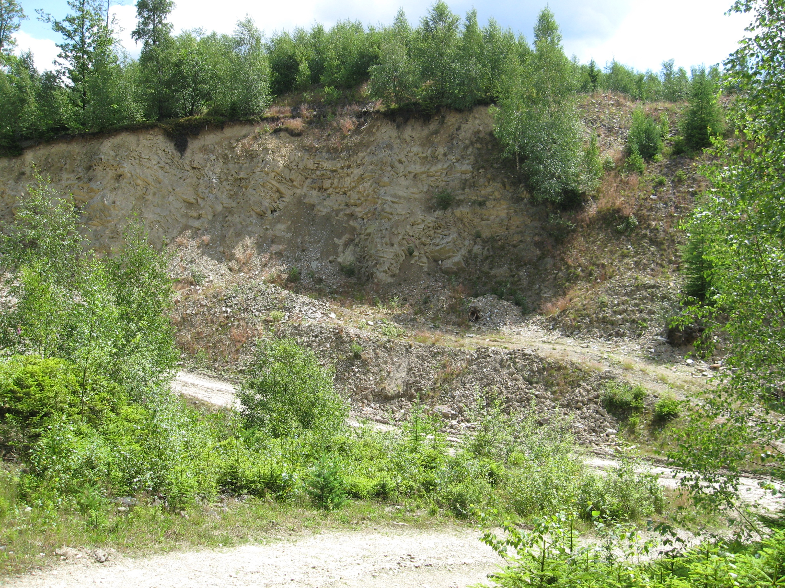 Aktiver Steinbruch am Westhang der Kalteiche bei Wilnsdorf, Nordrhein-Westfalen (DE).